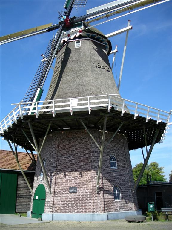 De Hoop, windmolen te Stiens, Friesland